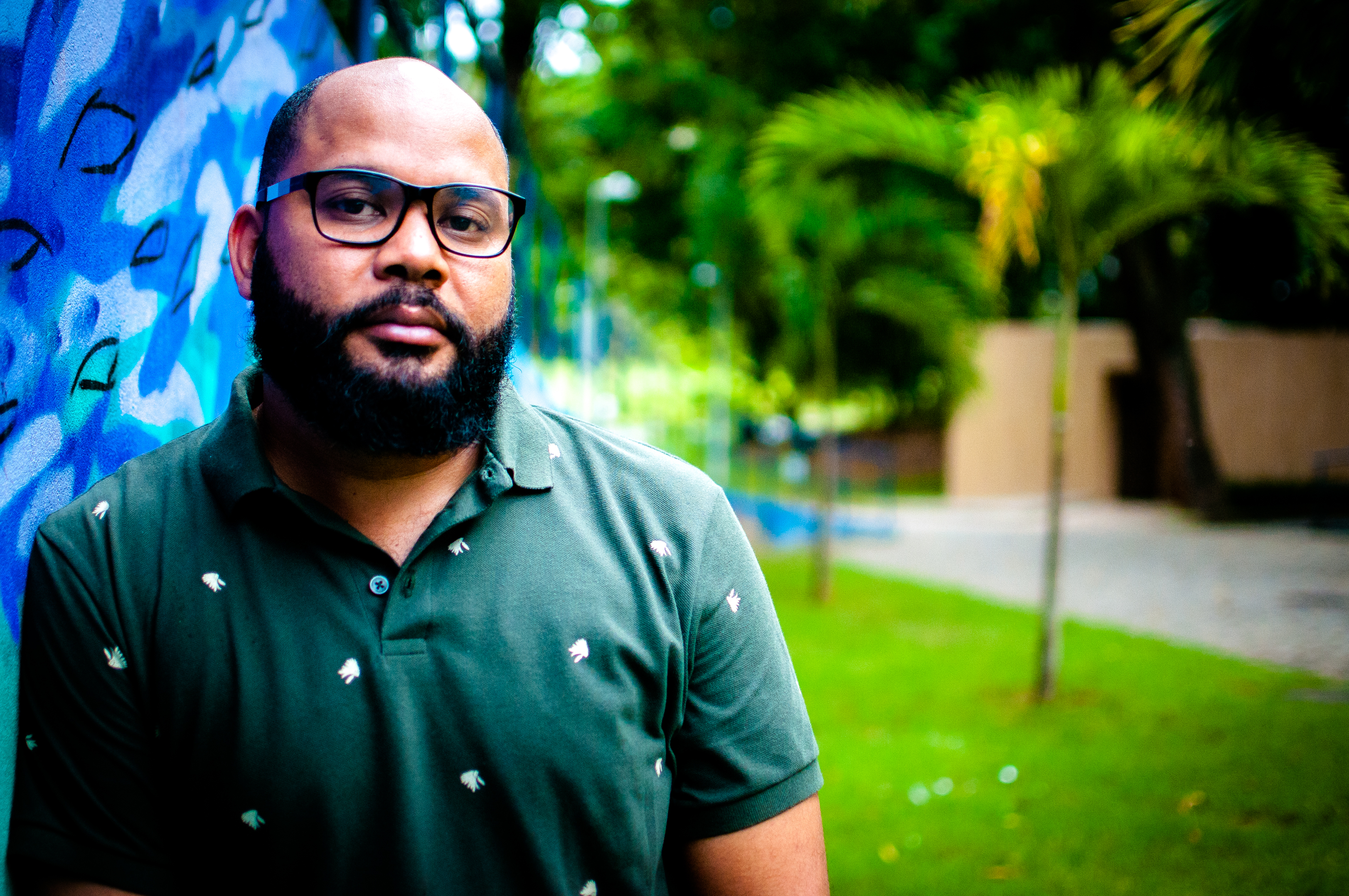 Wesley Correia, Parque da Cidade, Salvador, Ba, 2017.